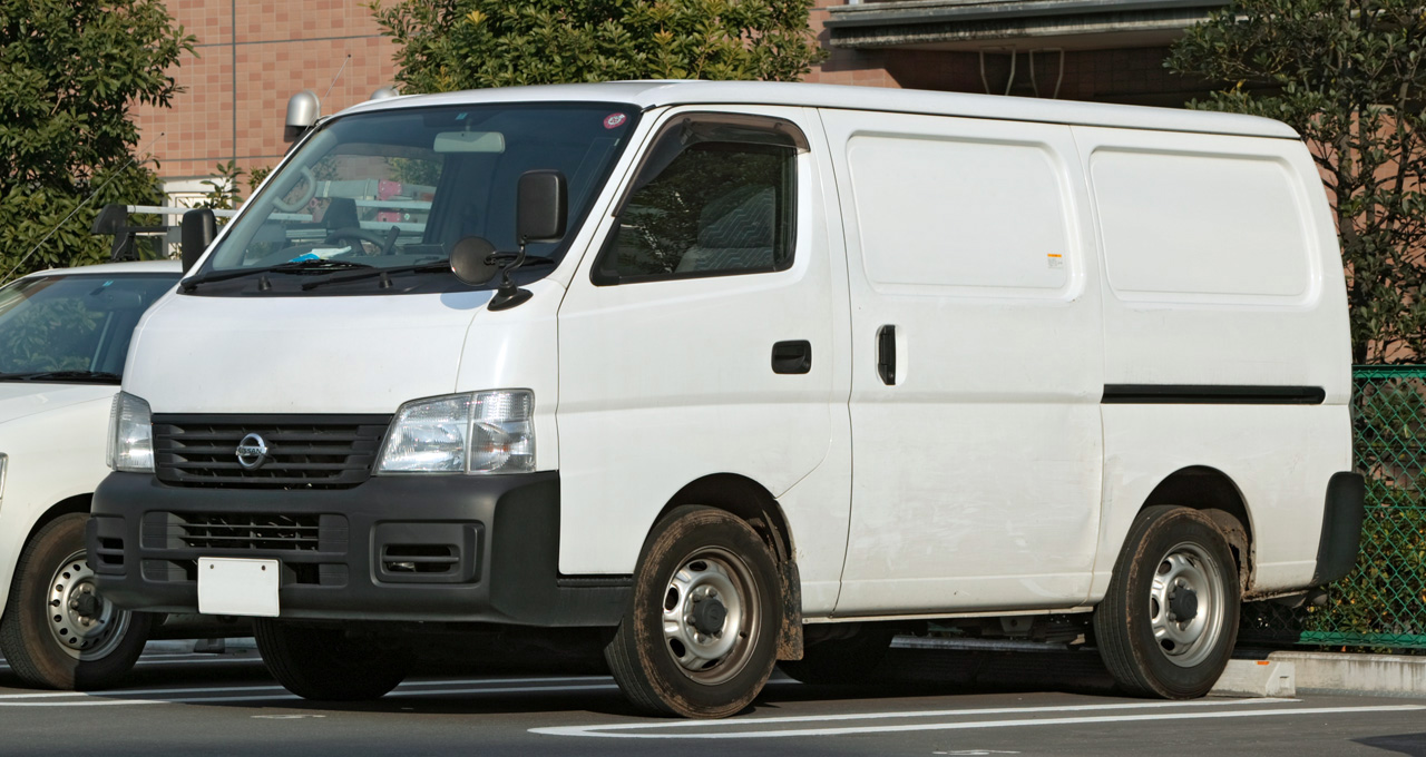 Nissan Caravan insulated van ( E25 )